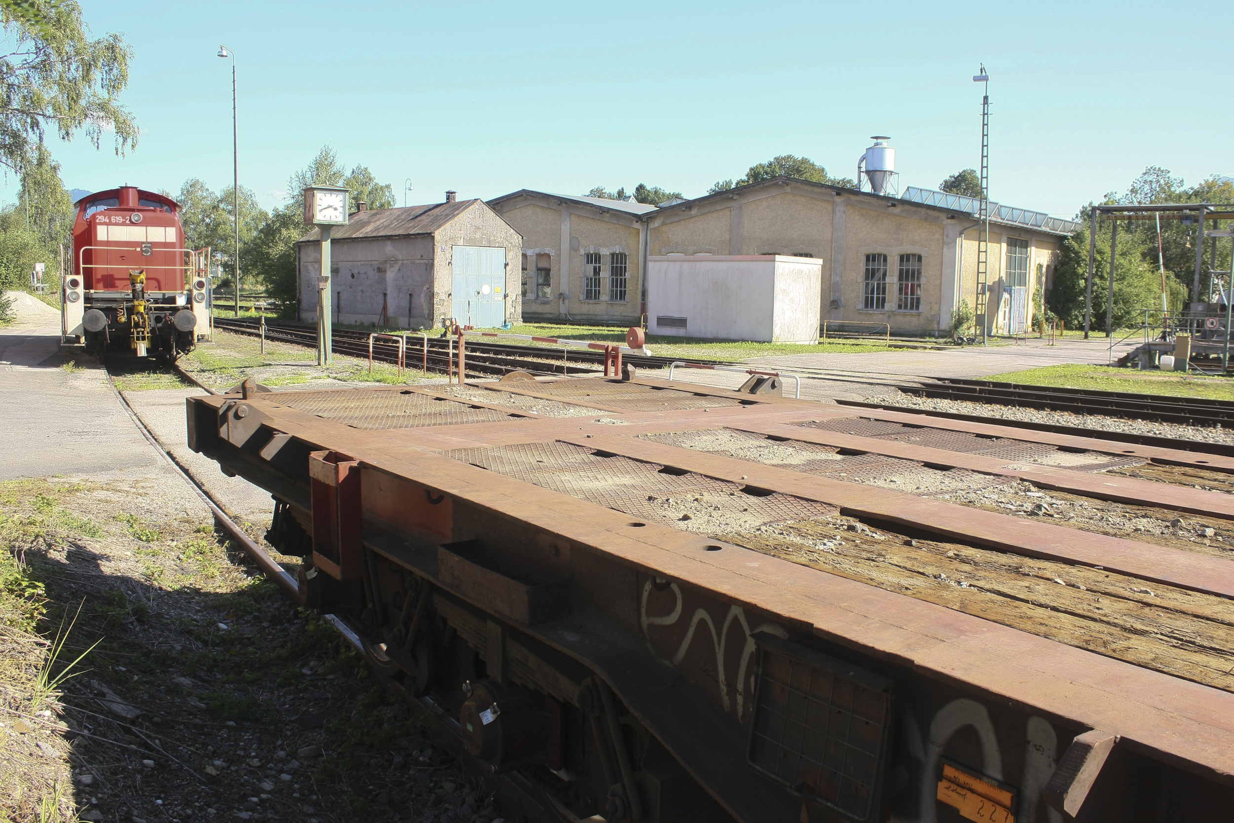 Bahnbetriebswerk, Betriebs- und Reparaturwerkstätte westlich des Bahnhofs mit Anschluß zur Hauptstrecke Rosenheim-Salzburg, im wesentlichen 1902-07 errichtet (Inbetriebnahme 1905) und 1924-26 im Zusammenhang mit der Elektrifizierung des Zugverkehrs erweitert, bestehend aus: Wagenrichthalle, Rechteckhalle mit parallelen Gleisständen, Kernbau 1902-05, in gleicher Bauweise gemäß urspr. Konzeption 1925/26 nach Norden und Osten erweitert; angeschlossen ehem. Radsatz-Werkstätte (Dreherei) mit Magazingebäude, 1902-05; Verwaltungs- und Übernachtungsgebäude, freistehender dreigeschossiger Satteldachbau, 1902-05; Halbrundschuppen für Triebfahrzeuge mit 20 Radialgleisen, 1902-05, mit Gelenk-Drehscheibe von 1923 (bez.) und Oberleitungsspinne; Ellok-Werkstatt, sog. Groß- und Kleinmontierhalle, in Eisenbetonkonstruktion, und Verbindungsbau zum Rundschuppen, 1924-26; mit zugehörigen Gleis- und Wartungsanlagen. This is a photograph of an architectural monument.